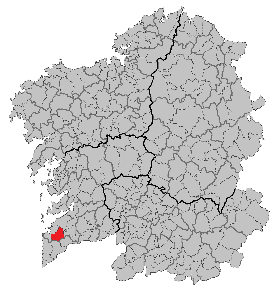 Mapa coa localización do concello de Gondomar.